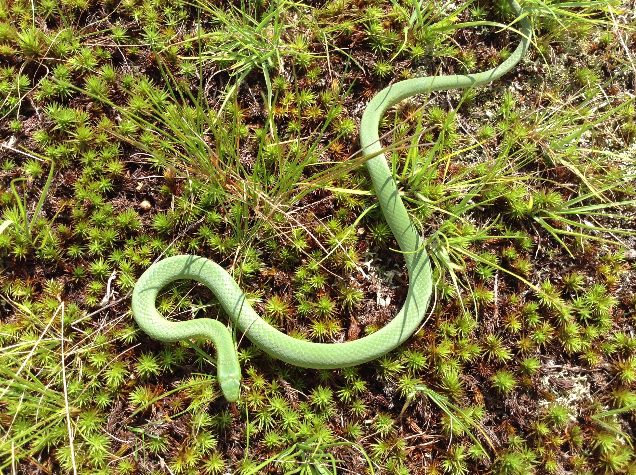 Smooth green snake, Torrance Barrens, Muskoka